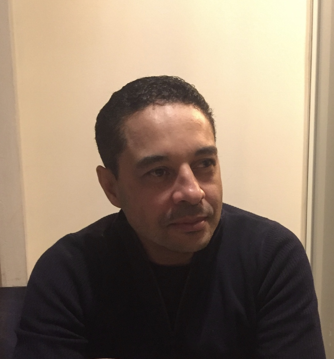 Aula de filosofia